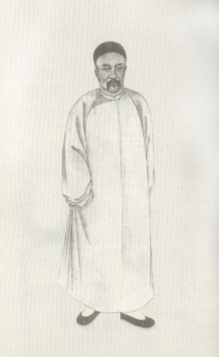 王懿榮，清朝學者。Wang Yirong